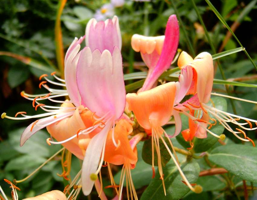 Lonicera periclymenum, Brno-Komín